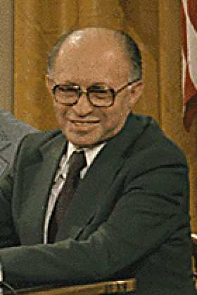 Menachem Begin in Camp David.